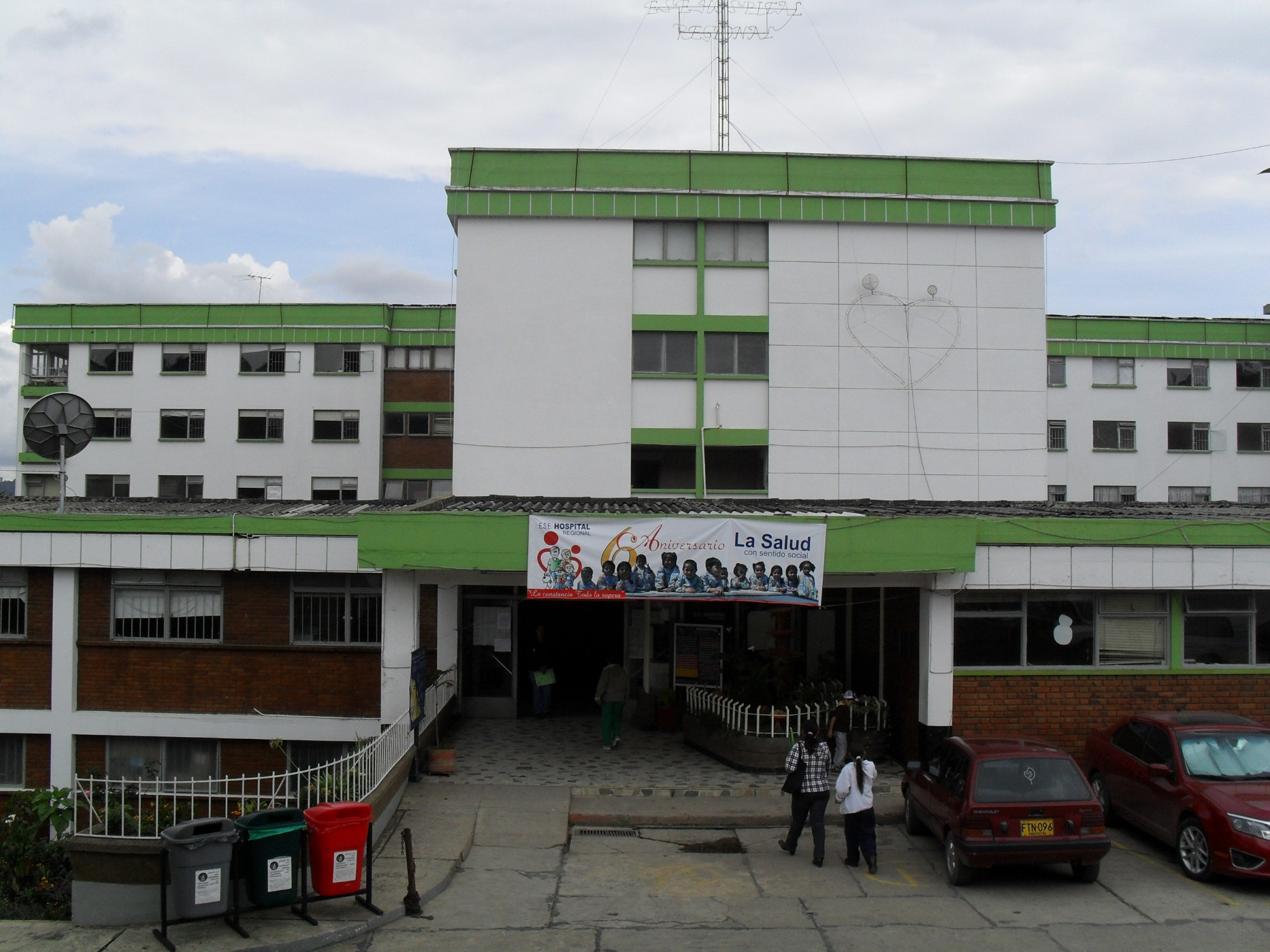 Fachada del Hospital regional de Chiquinquirá, Boyaca, Colombia